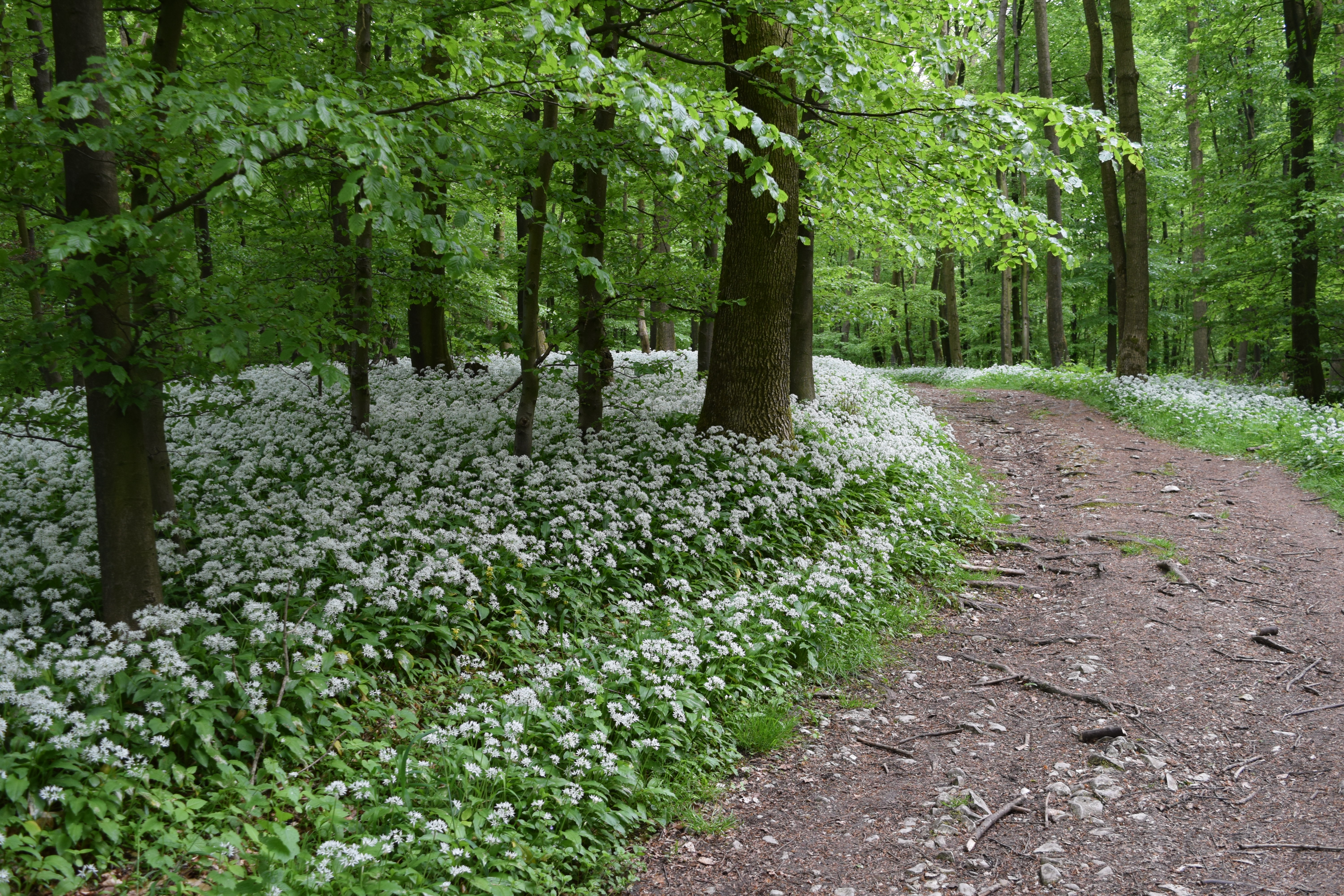 Bärlauchblüte im Teutoburger Wald; Hermannsweg; Natur- und Geopark TERRA.vita; Landschaftsschutzgebiet Teutoburger Wald